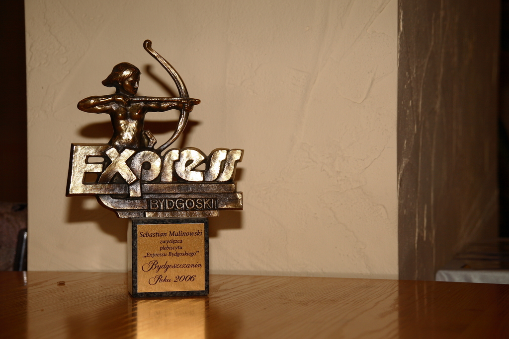 Statuetka Bydgoszczanin Roku 2006, przyznana Sebastianowi Malinowskiemu